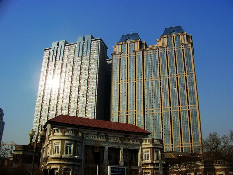 天津诚基中心